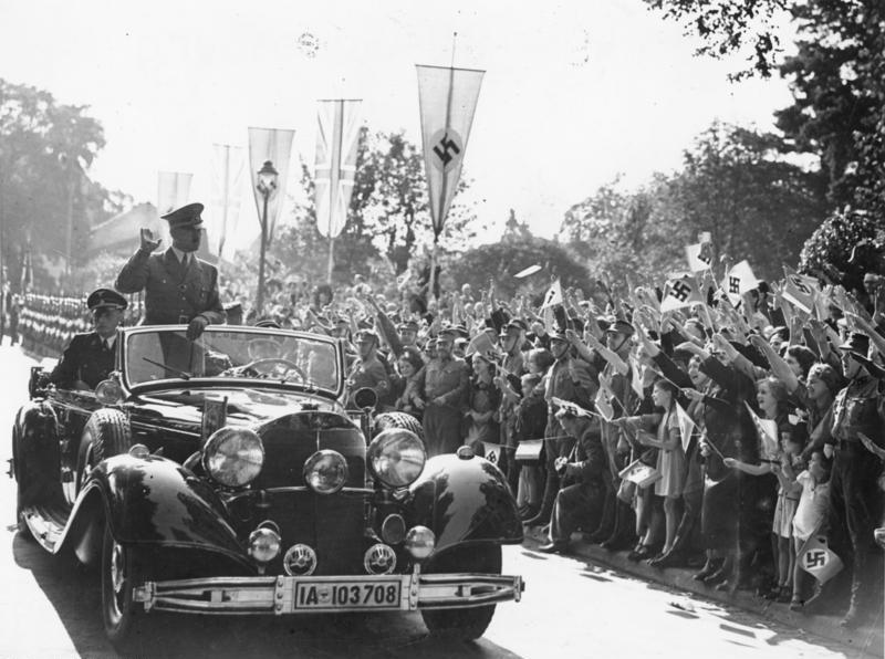 Scherl: Zur Besprechnung des Führers mit dem englischen Ministerpräsidenten Chamberlain in Bad Godesberg a/Rhein Unter dem Jubel der Bevölkerung führt der Führer vom Bahnhof Godesberg zum Hotel Dreesen, wo die Besprechung stattfindet. Fot.: 22.9.38